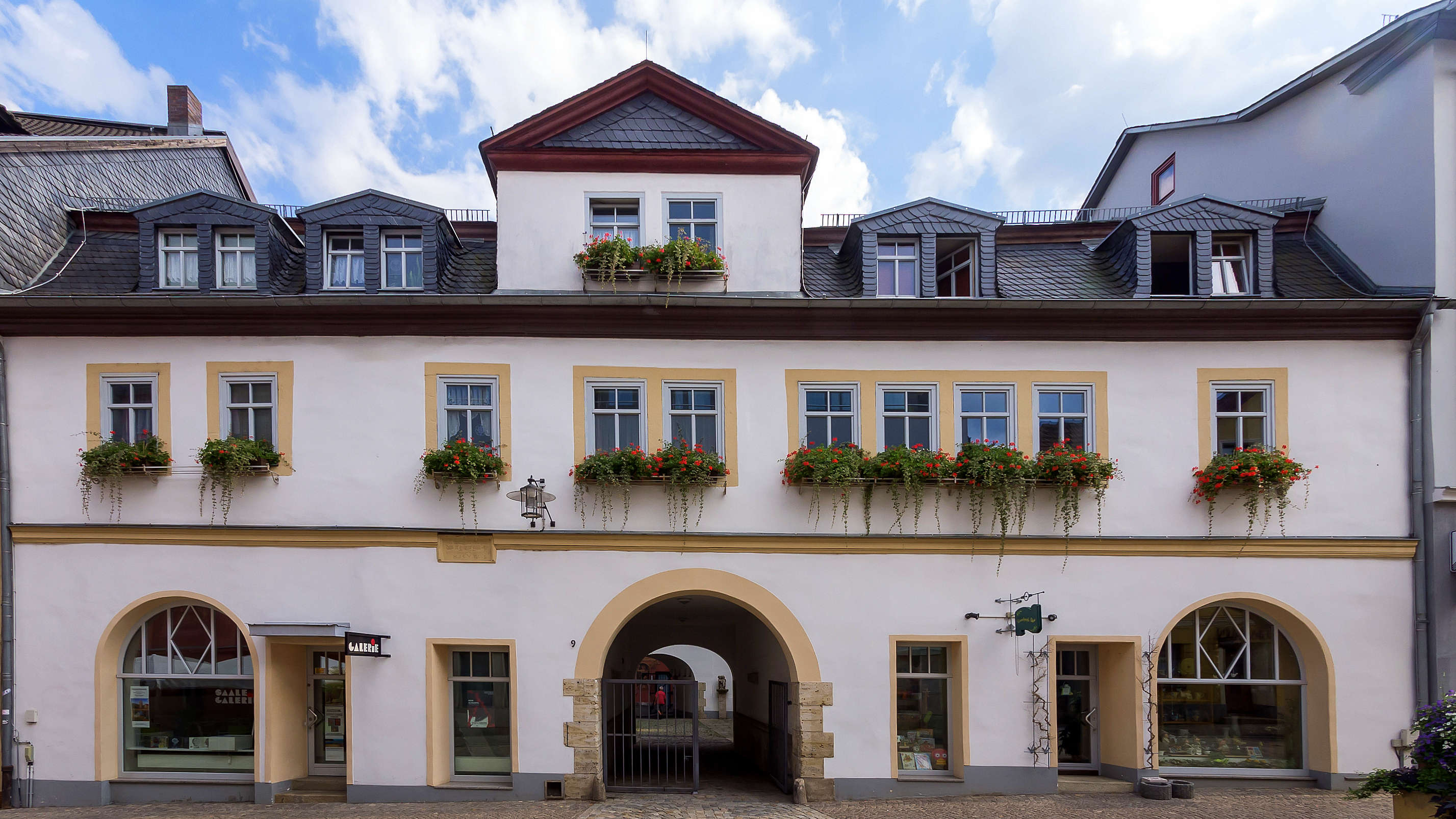 Saalfeld-Saale Brudergasse 9 Ehem. Handelshaus Bestandteil Denkmalensemble "Stadtkern Saalfeld-Saale" 4